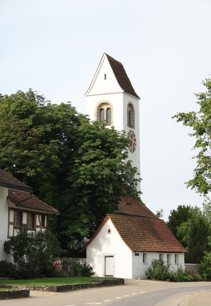 Kirche Niederbipp